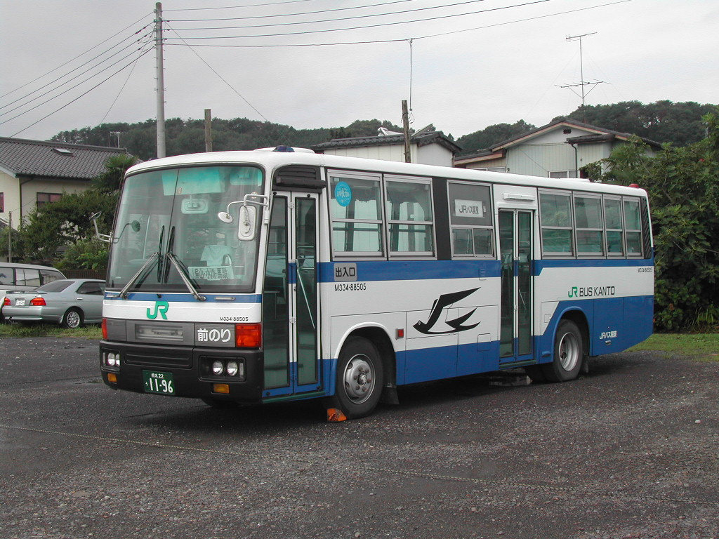 烏山支店にて、許可を得て撮影 馬頭行き